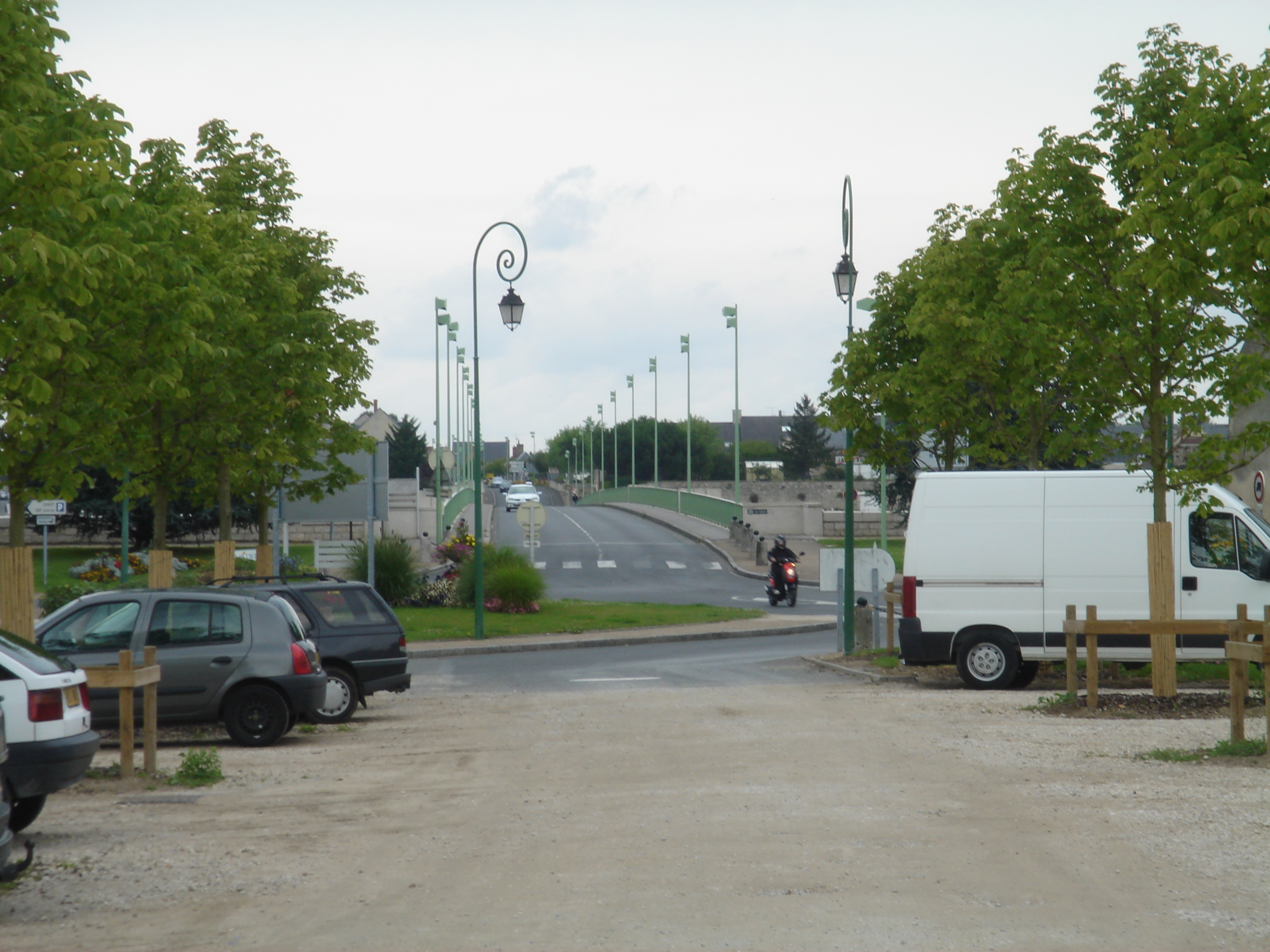 Le pont de Jargeau (Loiret) depuis le Boulevard Carnot, rive gauche de la Loire